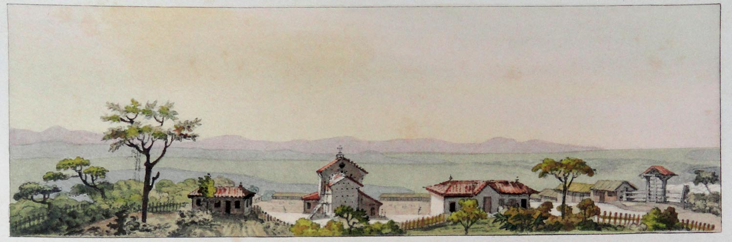 um dos primeiros registros visuais de Torres